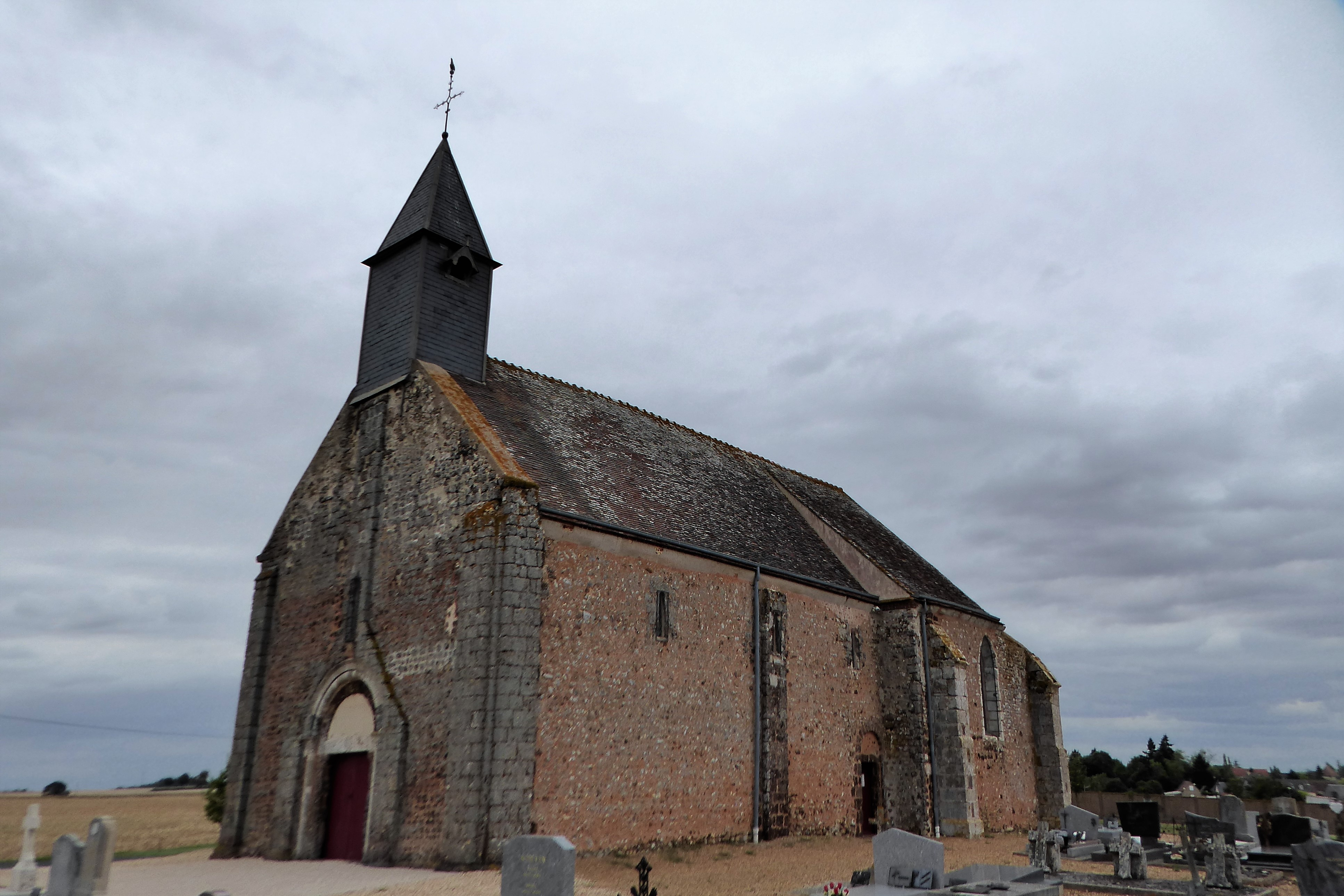 église Saint-Rémy, Dangers, Eure-et-Loir, France.